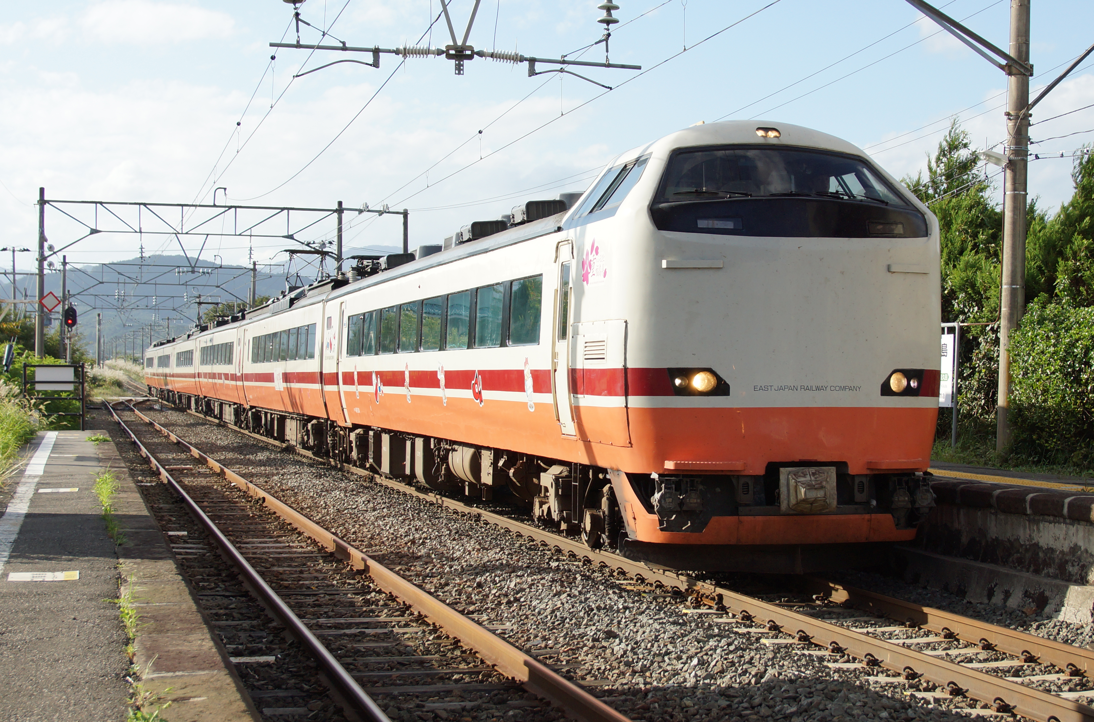 1番線通過中の485系「あいづライナー」